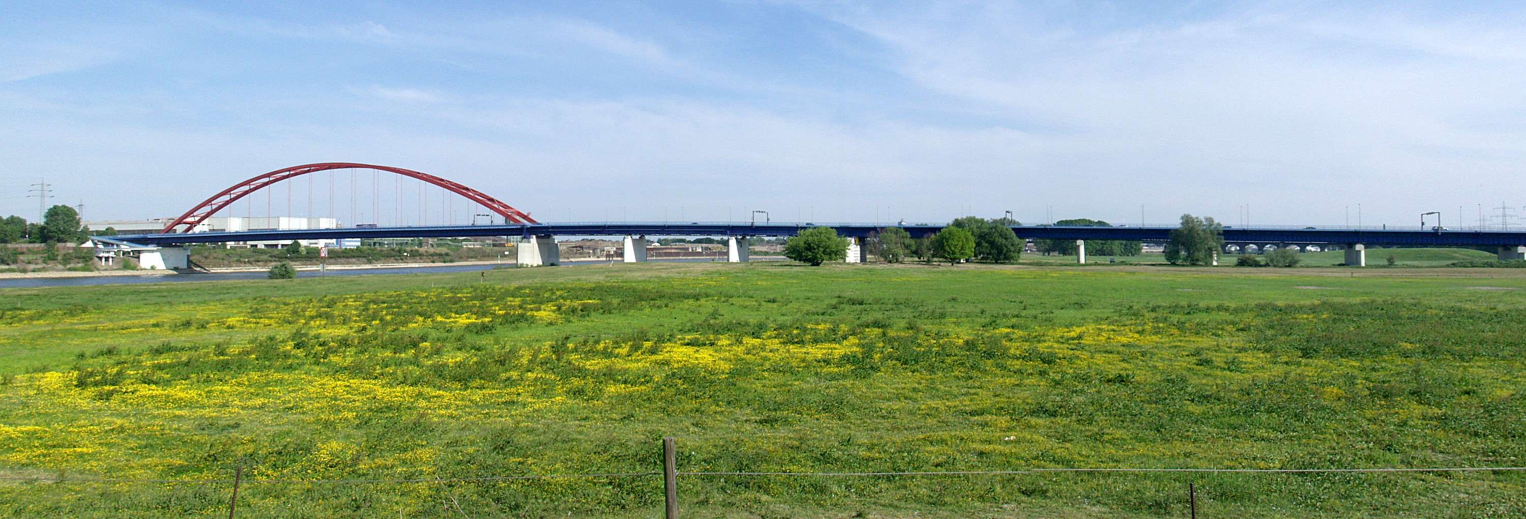 Brücke der Solidarität über den Rhein bei Duisburg-Rheinhausen